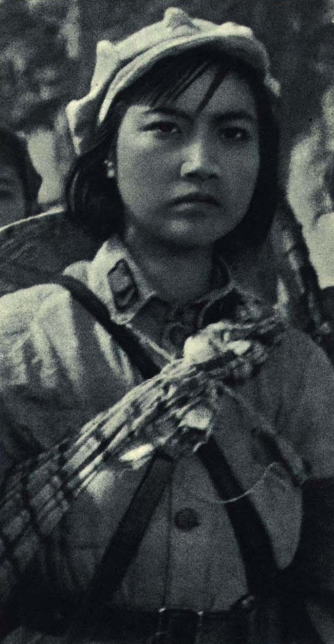 1962-07 1962年 祝希娟在电影红色娘子军